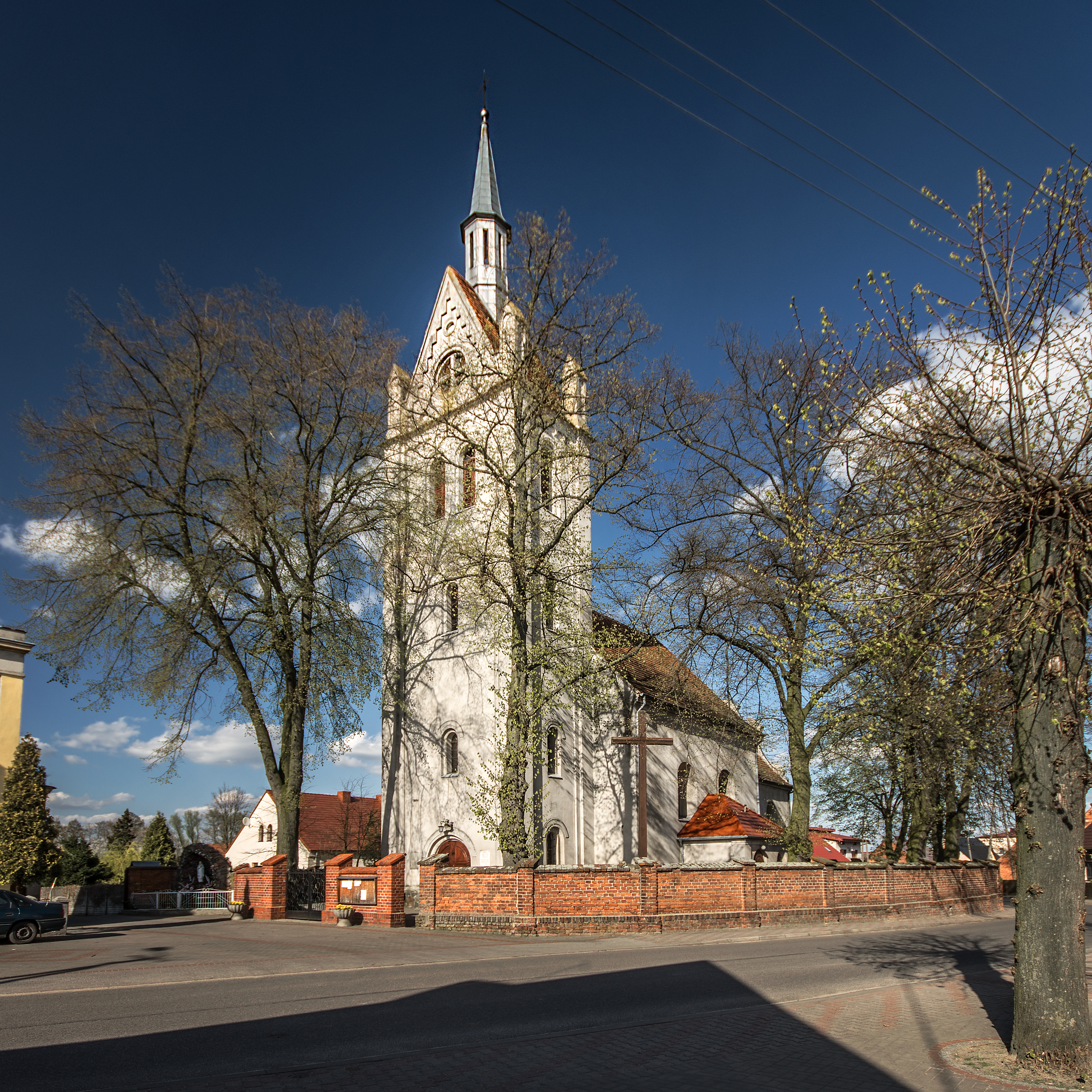 Bukownica, kościół par. p.w. śś. Filipa i Jadwigi, 1776